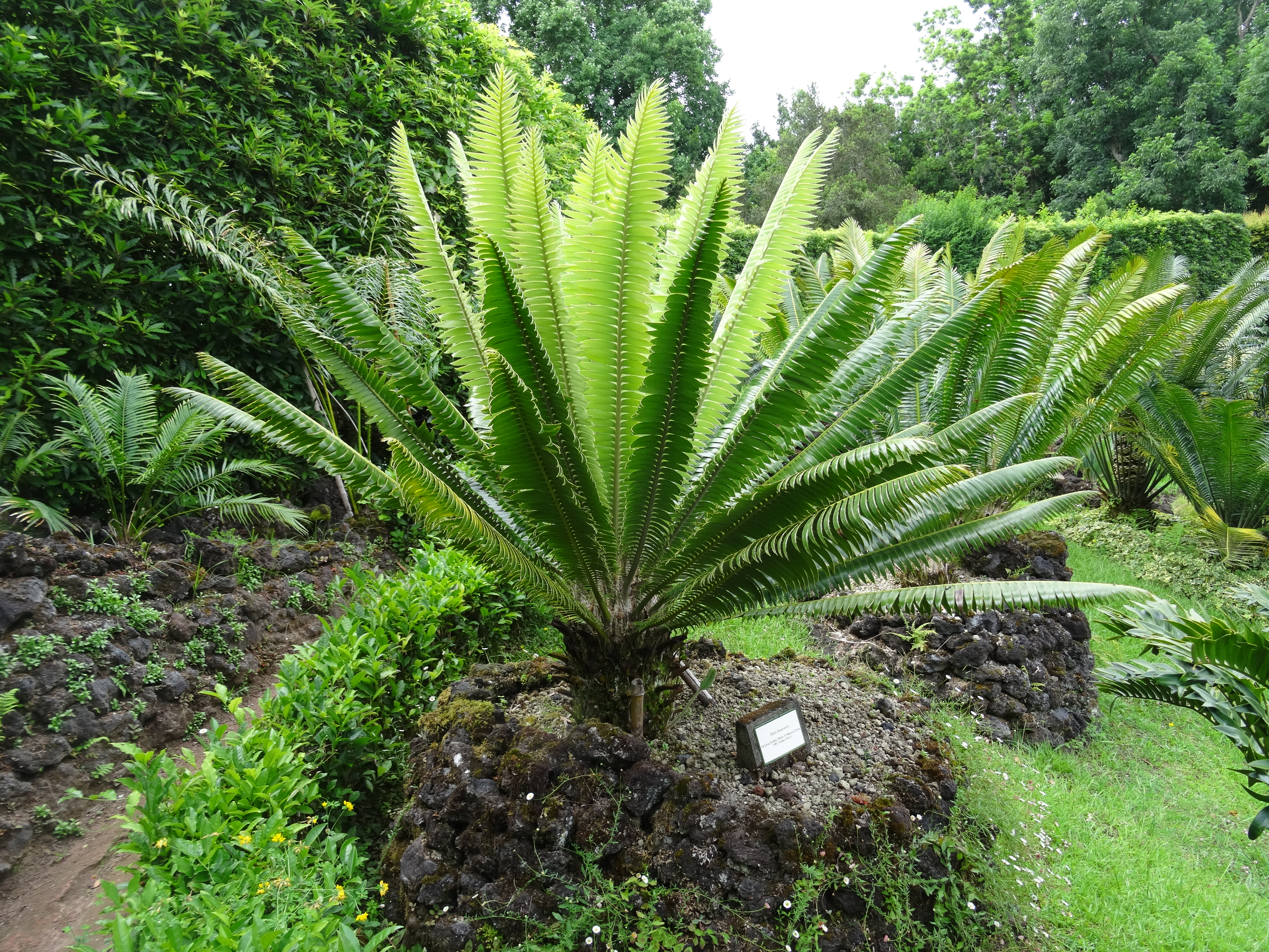 Dioon rzedowskii, Parque Terra Nostra, Furnas, Azoren